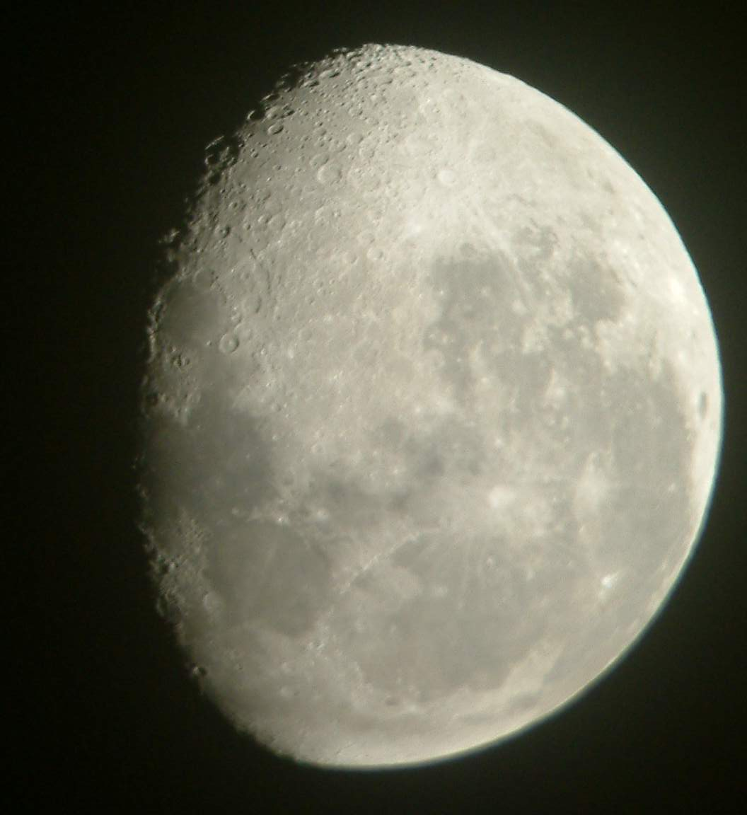 cliché réalisé par Yves 3 oct 2004 à 00:27 (CEST)